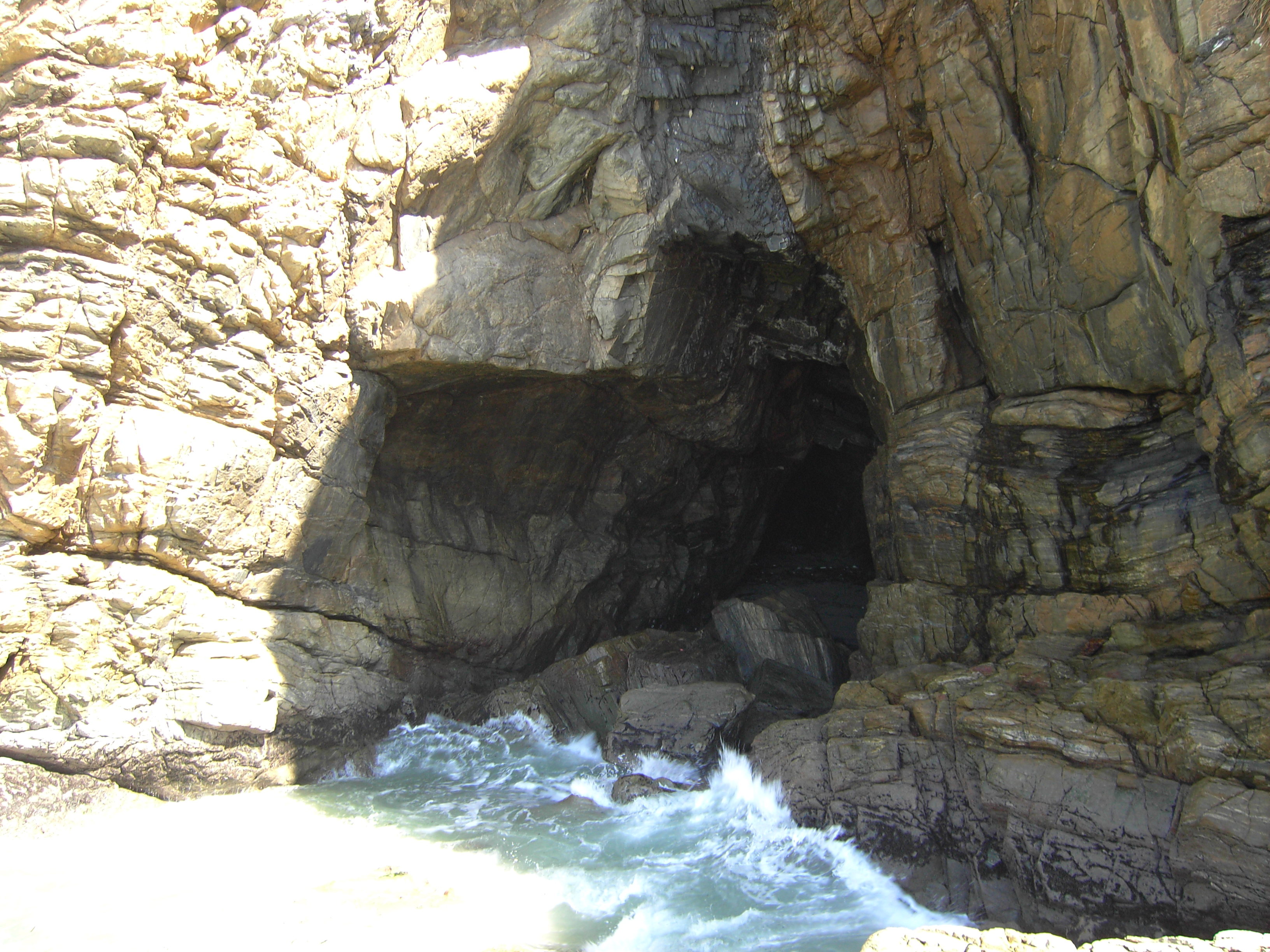 Gruta das Encantadas, Ilha do Mel, Paranaguá-PR